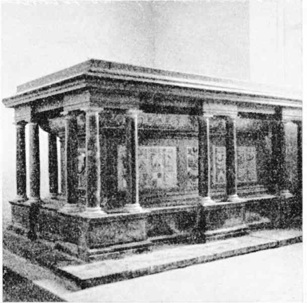 Gravmonument över Mauritz Sture och hans hustru Anna Horn af Åminne, 1590-tal. Kategori: (09) GravarGravmonument över Mauritz Sture och hans hustru Anna Horn af Åminne, 1590-tal.